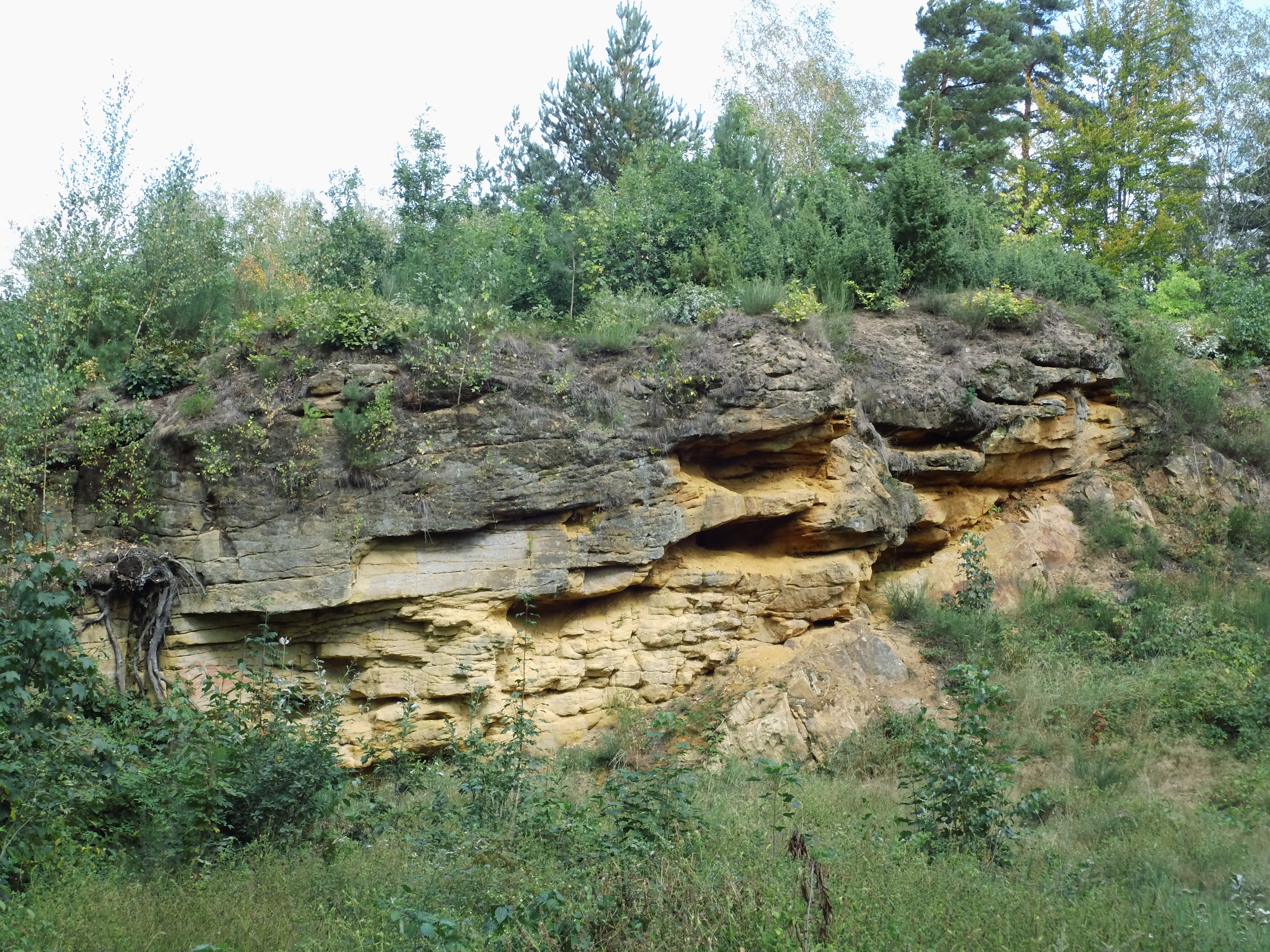 Na skalách skalní stěny